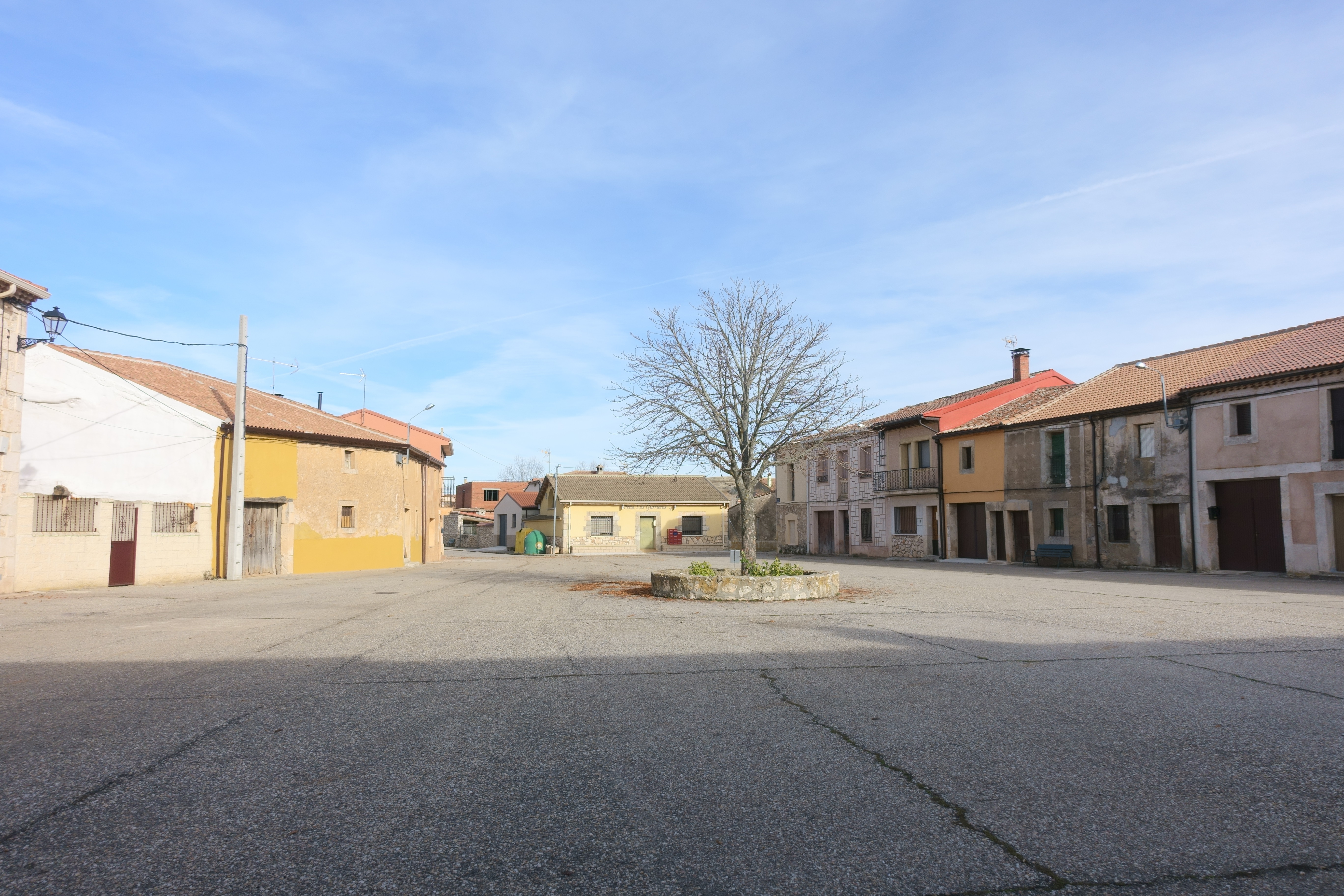 Plaza Mayor de Bercimuel (Segovia, España).